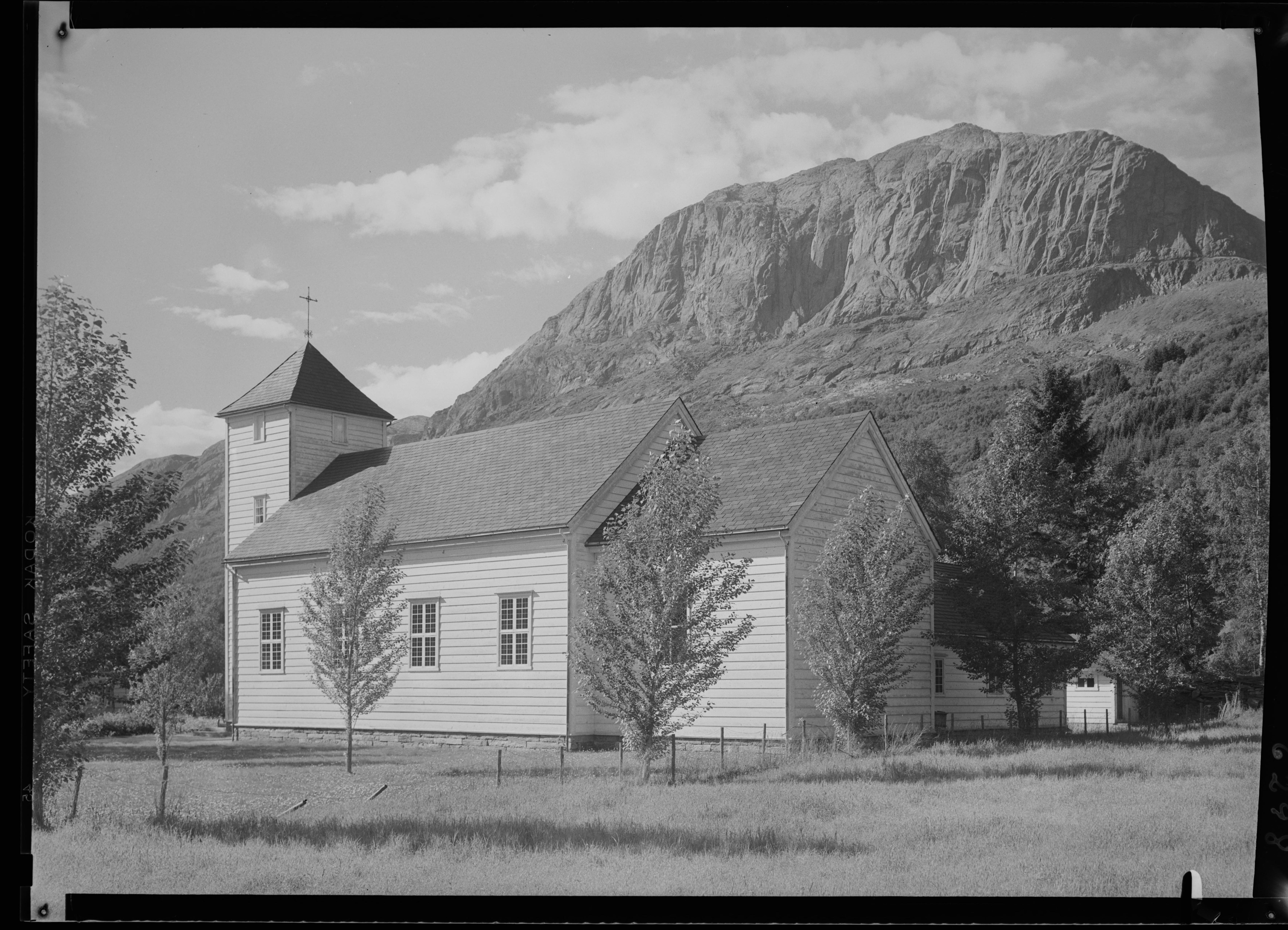 Bildet er hentet fra Nasjonalbibliotekets bildesamling. Anmerkninger til bildet var: Fotograf :Ukjent Bygstad,Kvamshesten, Gaular, Sogn og Fjordane